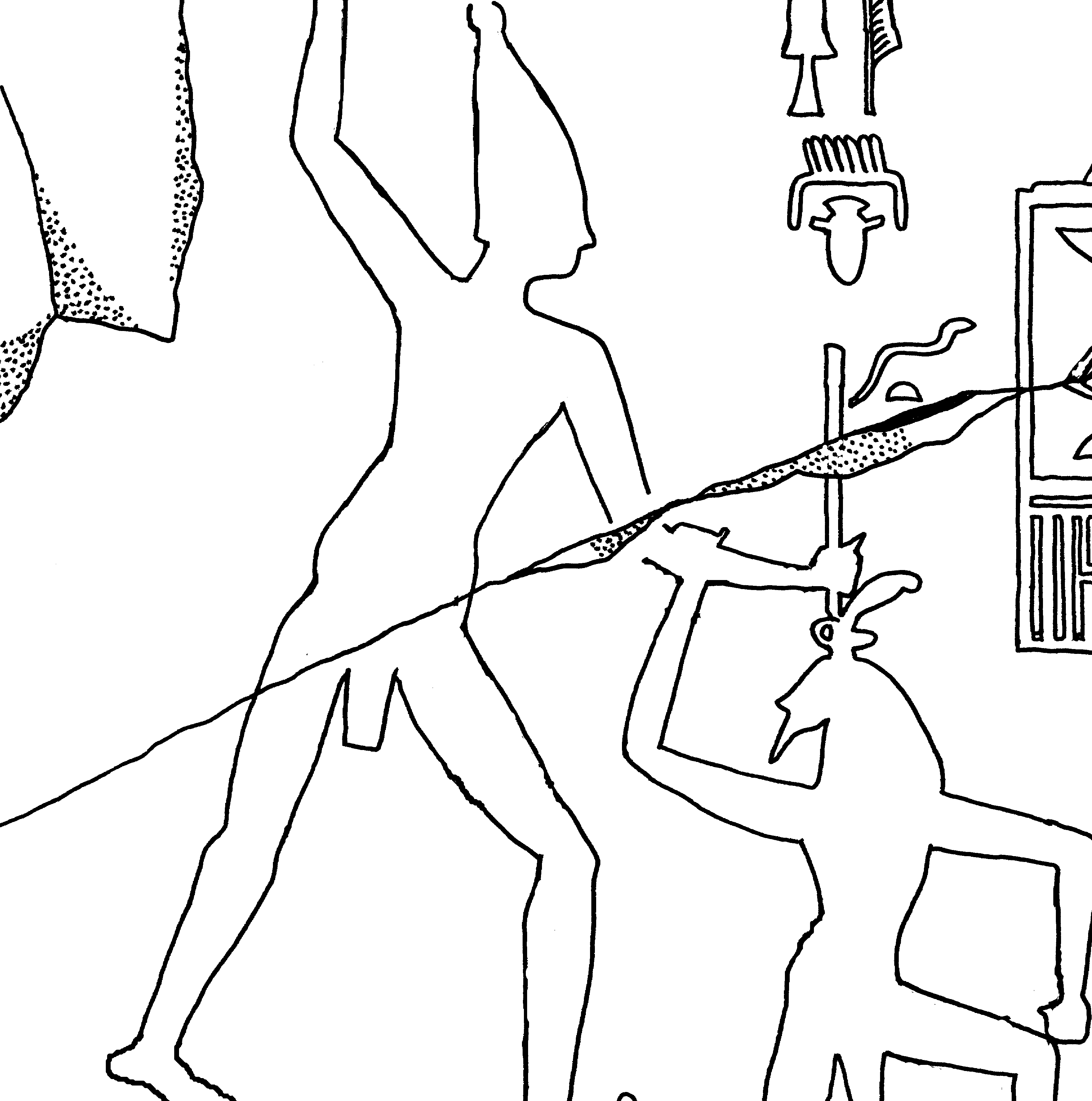 Sandsteinrelief des Snofru aus dem Wadi Maghara